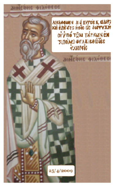 Ο Κύπριος Μητροπολίτης και Εθνομάρτυρας, Φιλόθεος Χατζής.